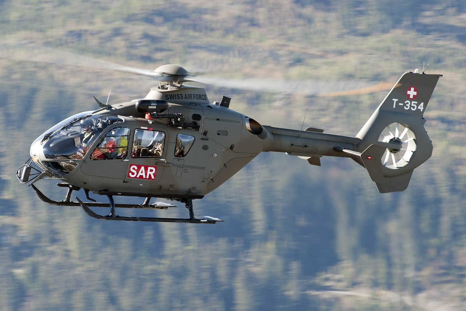 EC635 Swiss Air Force, Gidisdorf, Lauterbrunnen, Switzerland